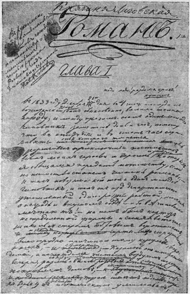 The manuscript of the novel "The Princess Ligovski."